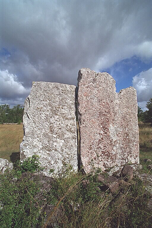 Motiv: Odens flisor Kategori: Grav markerad av rest sten/block .